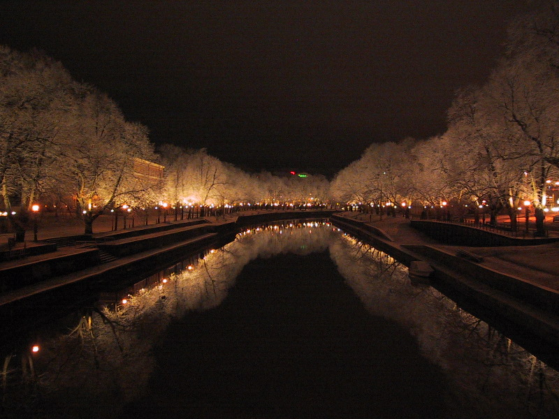 Aurajoki, Turku